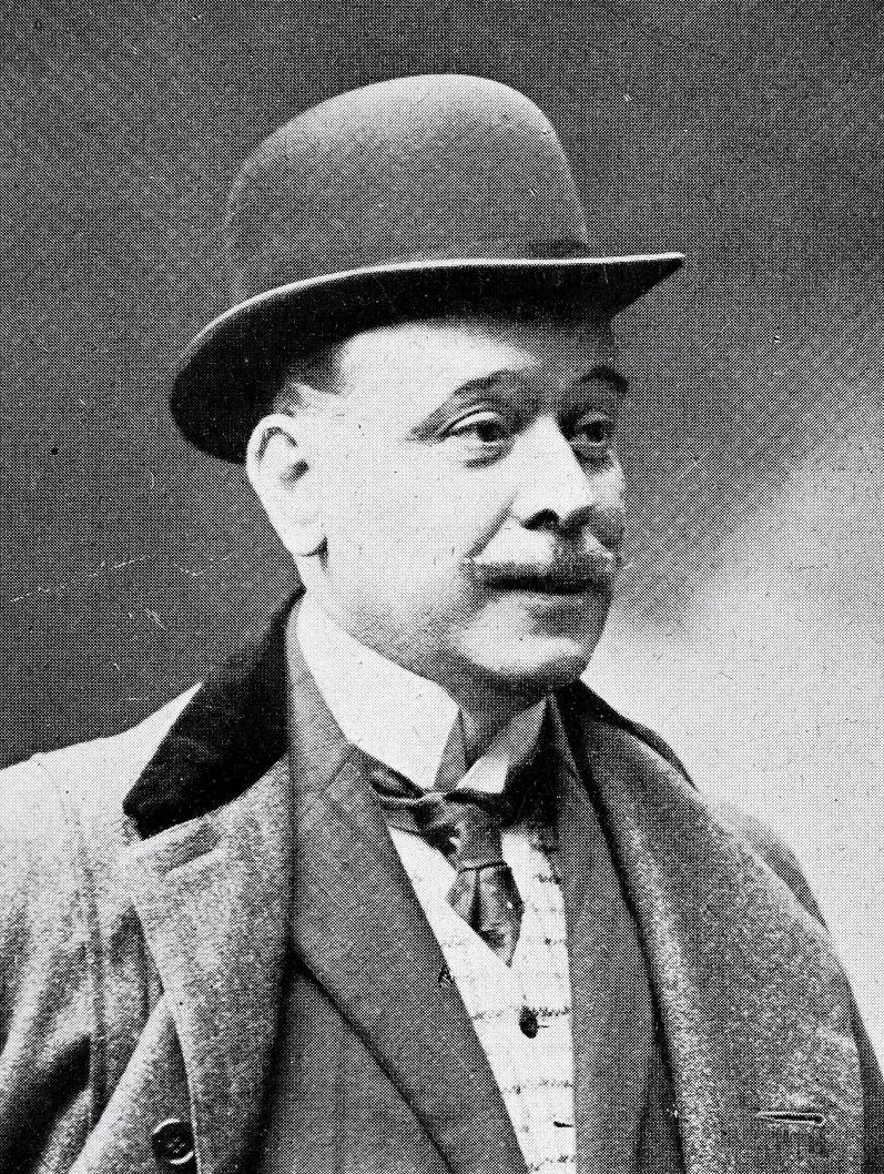 JOSÉ DE ROUREFot. Franzen